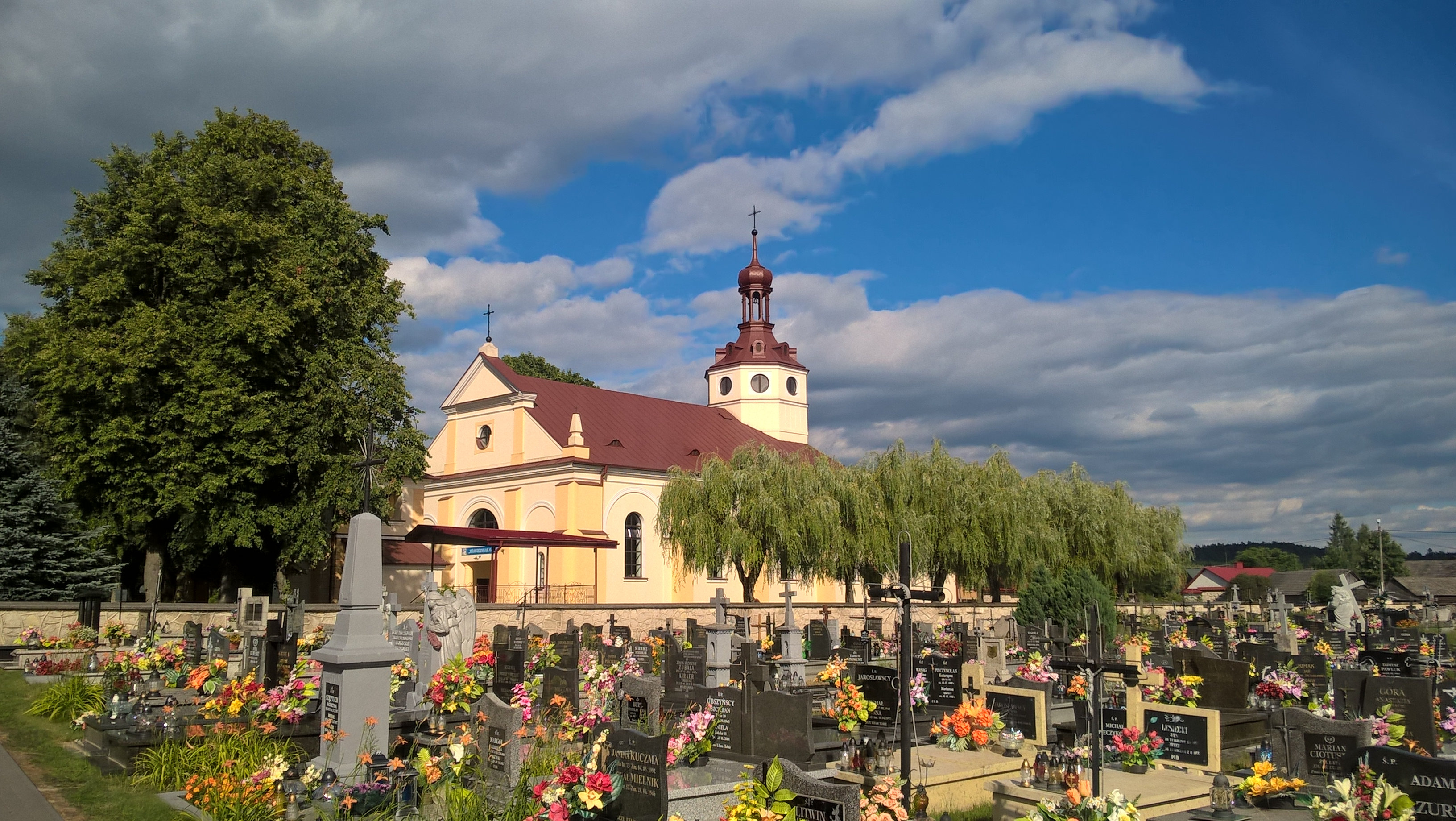 Cmentarz w Tereszpolu